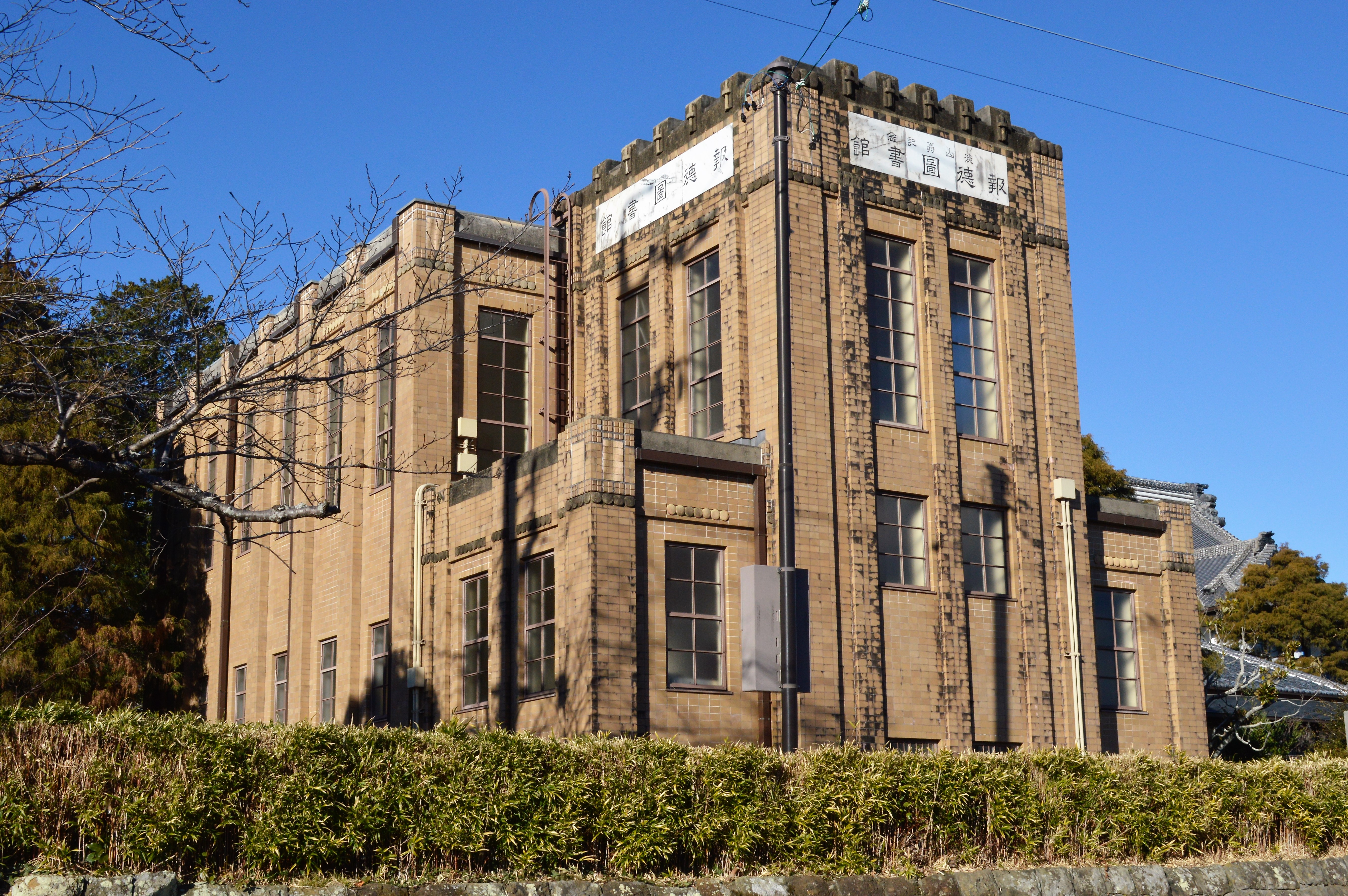 静岡県掛川市の淡山翁記念報徳図書館。